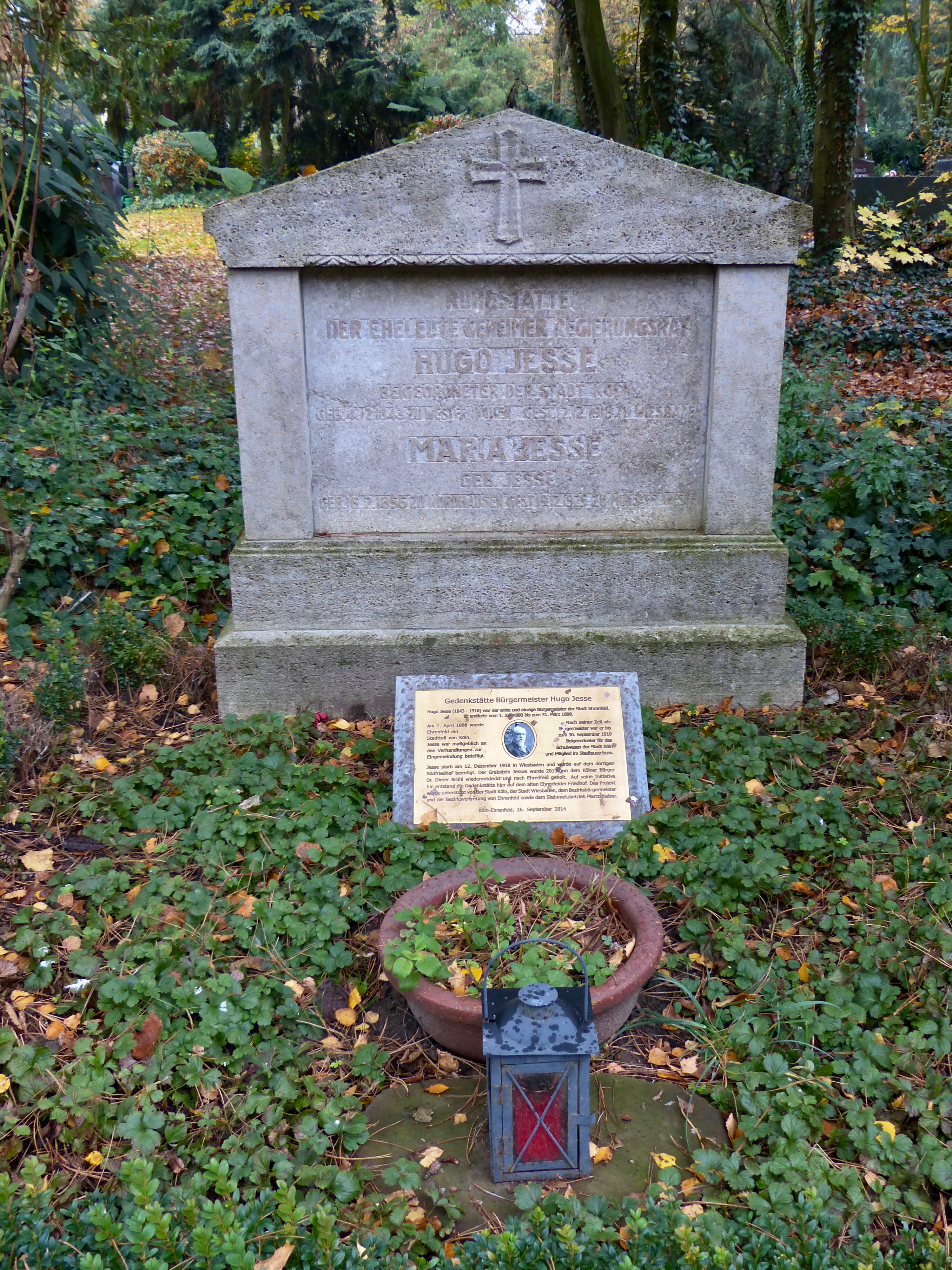 Grabmal auf dem Alten Ehrenfelder Friedhof: Grabmal Hugo Jesse, Bürgermeister in Ehrenfeld